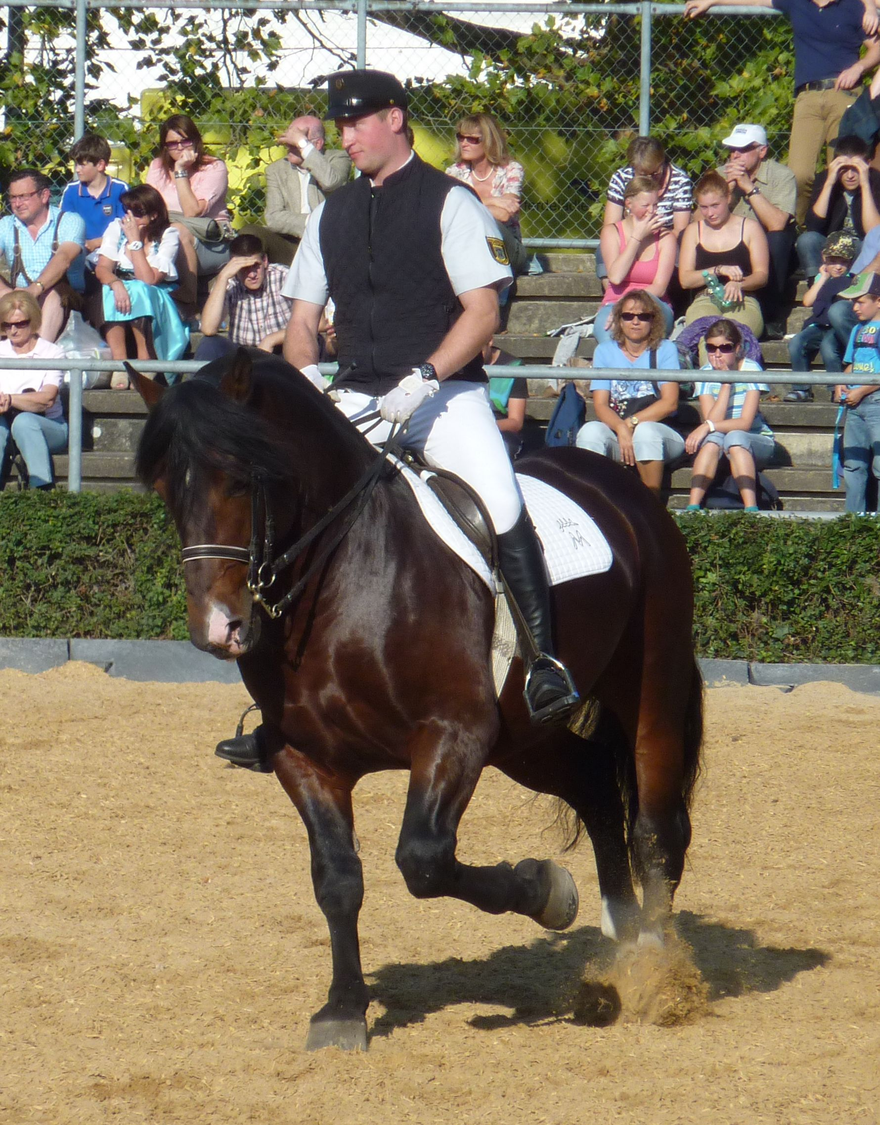 Vorführungen auf dem Landwirtschaftlichen Hauptfest 2014; Hengst Ulysse des Prés vom Haupt- und Landgestüt Marbach